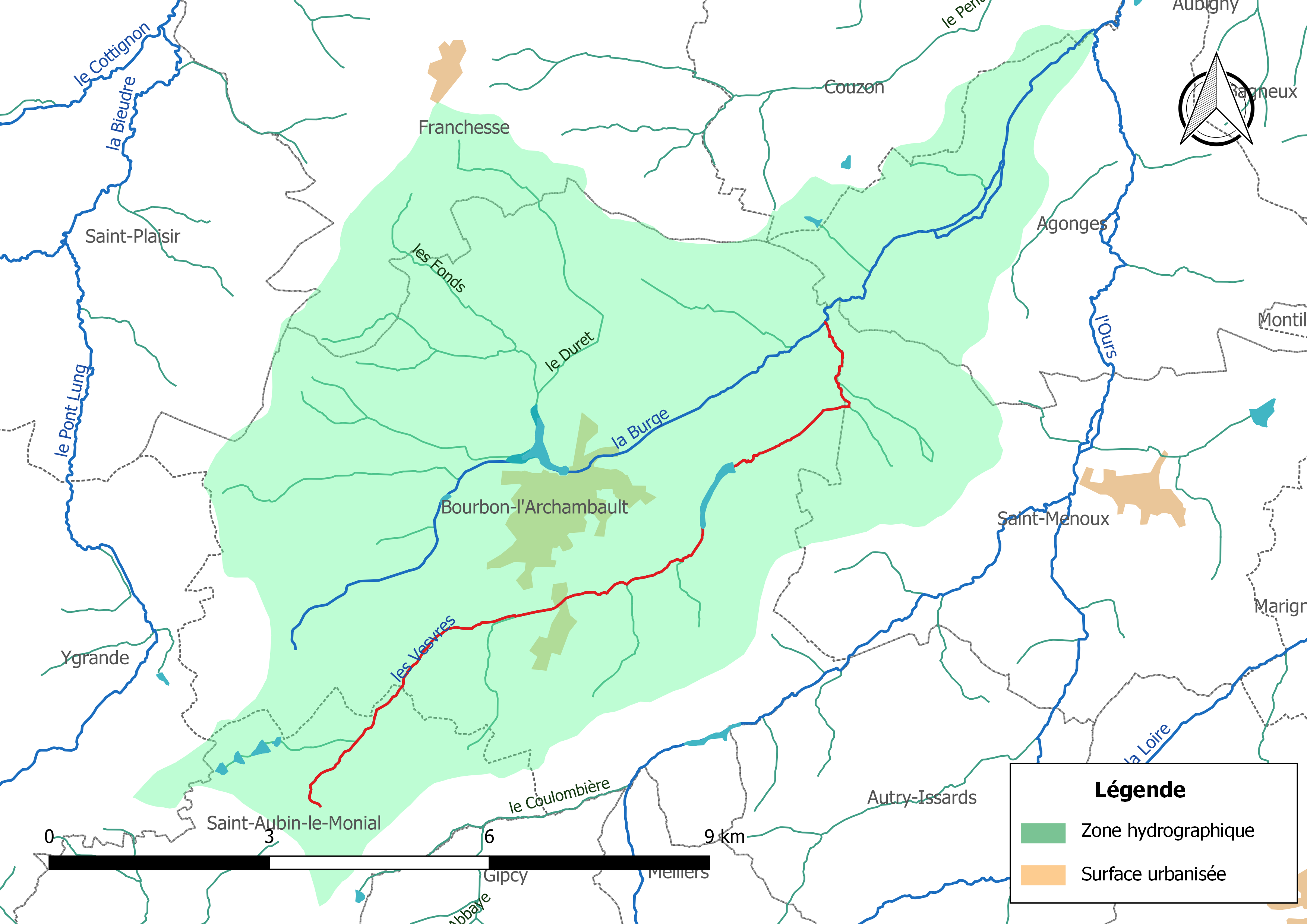 Carte du cours d'eau « les Vesvres » (France) et de la zone hydrographique dans laquelle il s'insère.